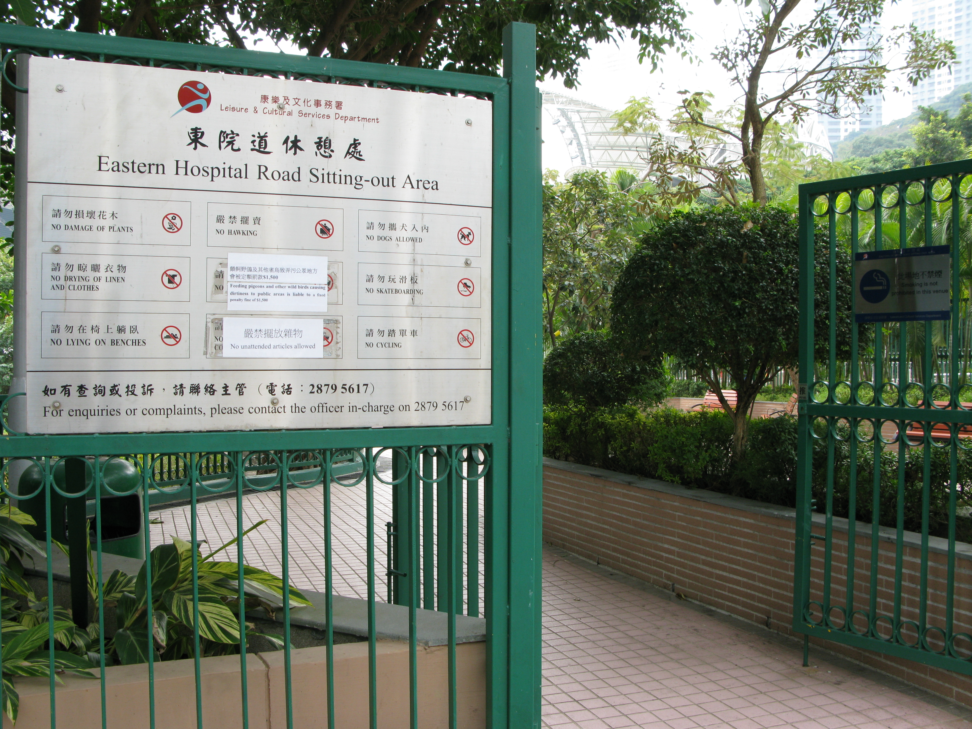 中文（香港）: 香港掃桿埔東院道東院道休憩處